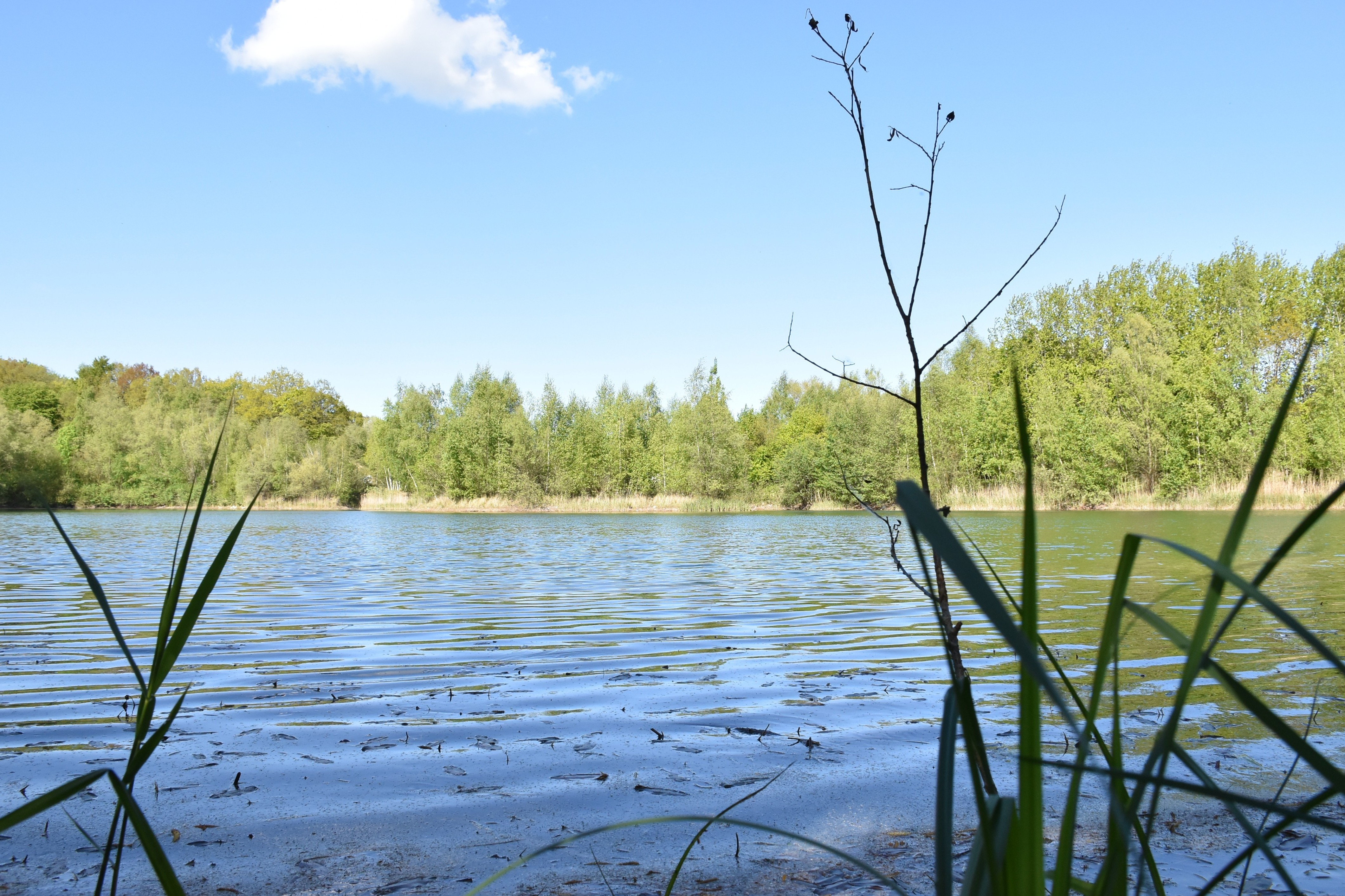 Kreuzkamper Seenlandschaft